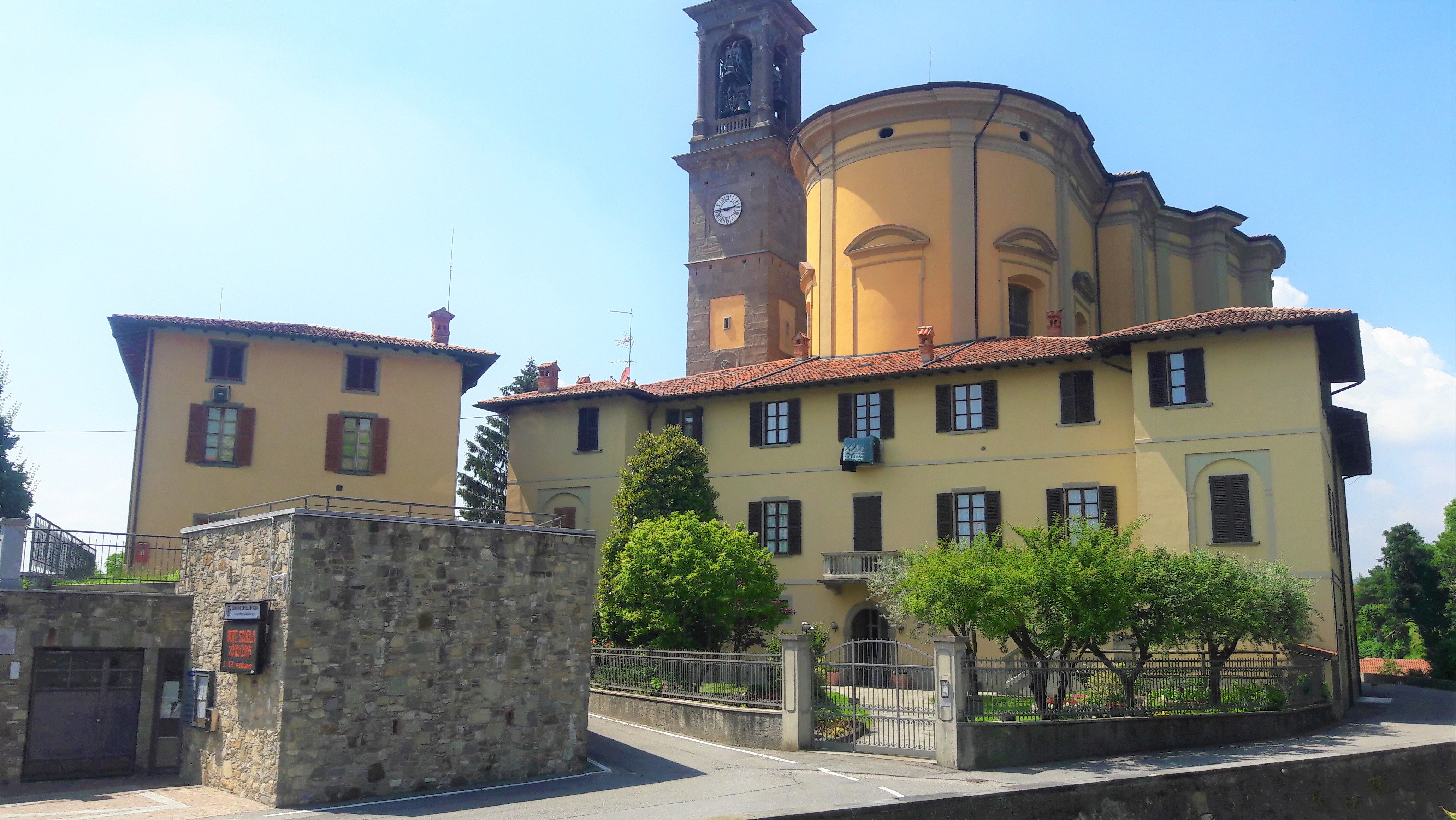 La canonica della chiesa parrocchiale di Villa d'Adda, sulla sinistra il municipio.